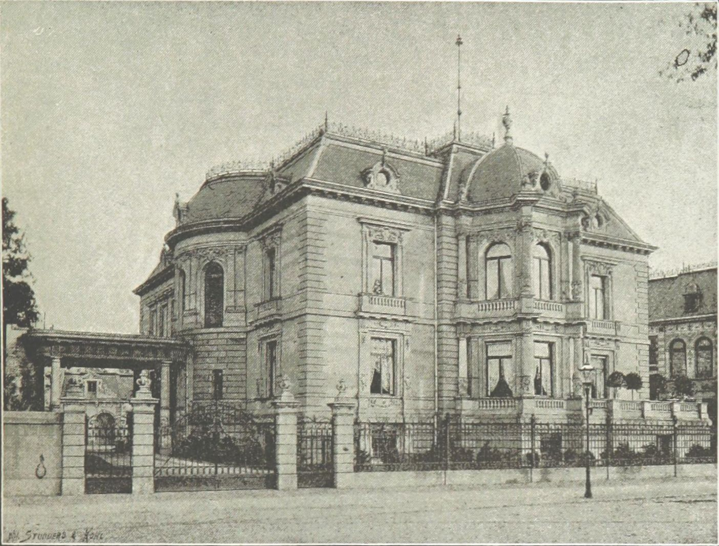 Villa des Leipziger Großkaufmanns Wilhelm Oelßner im Villenviertel Karl-Tauchnitz-Straße. Alte Hausnummer 29, nach neuer Zählung 13. Erbaut 1888 nach Plänen von Max Pommer Ansicht